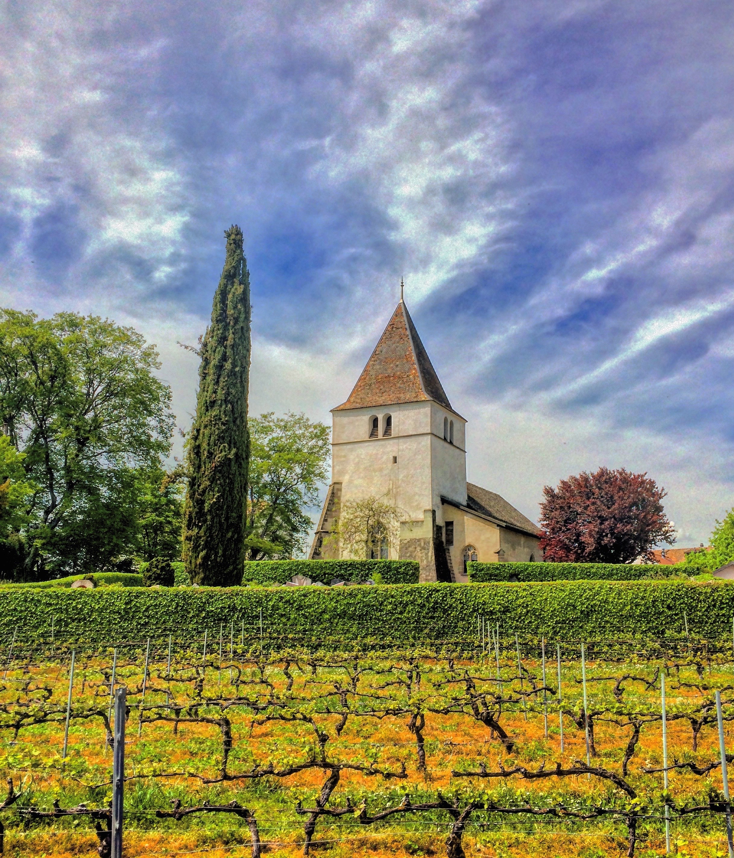 L'église réformée protestante Saint-Christophe de Commugny.